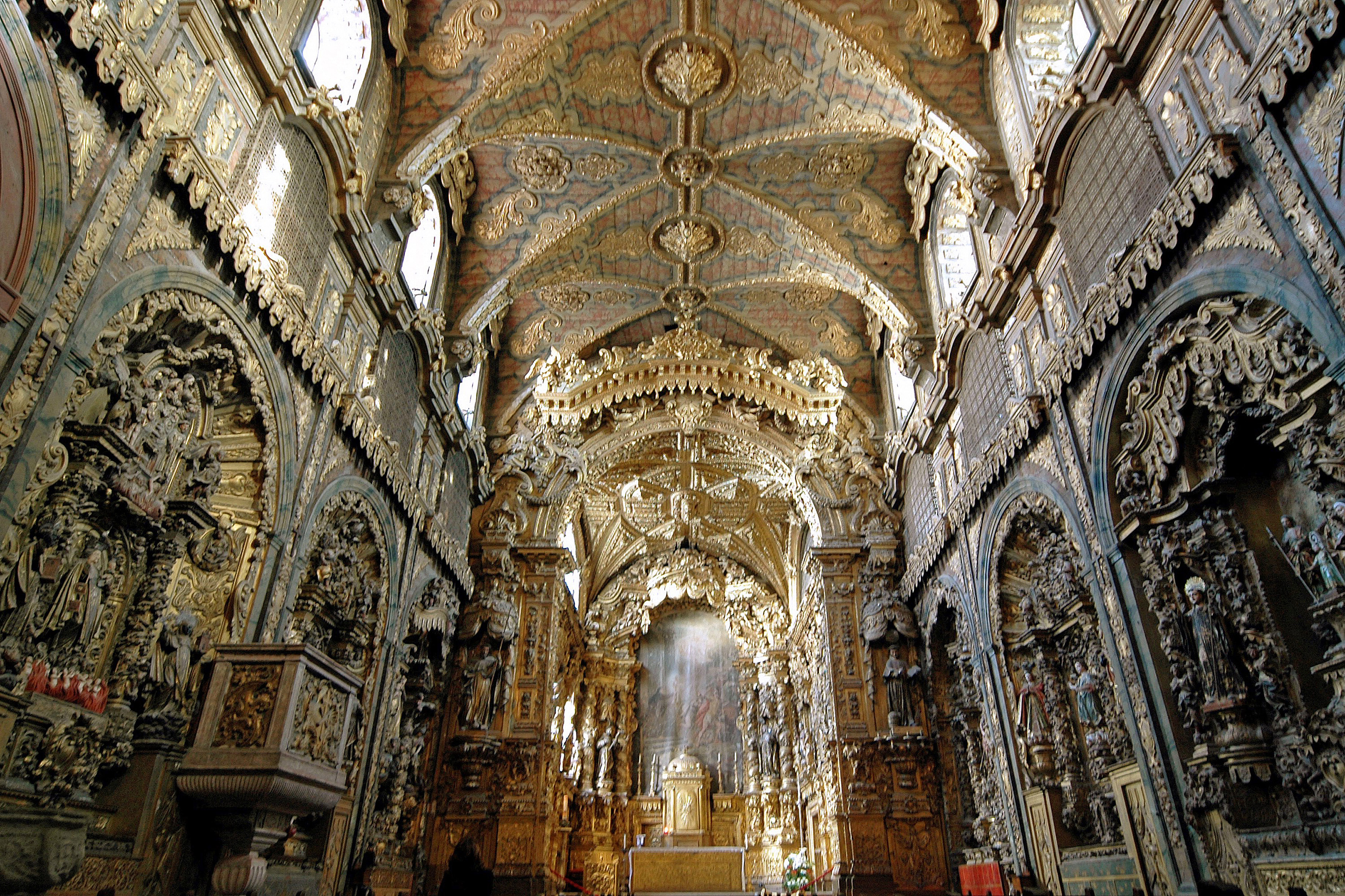 Igreja de Santa Clara - Altar-mor This file was uploaded for Wiki Loves Monuments in Portugal with the unique identifier 70198.